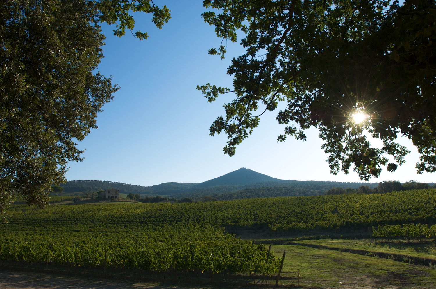 Vigna